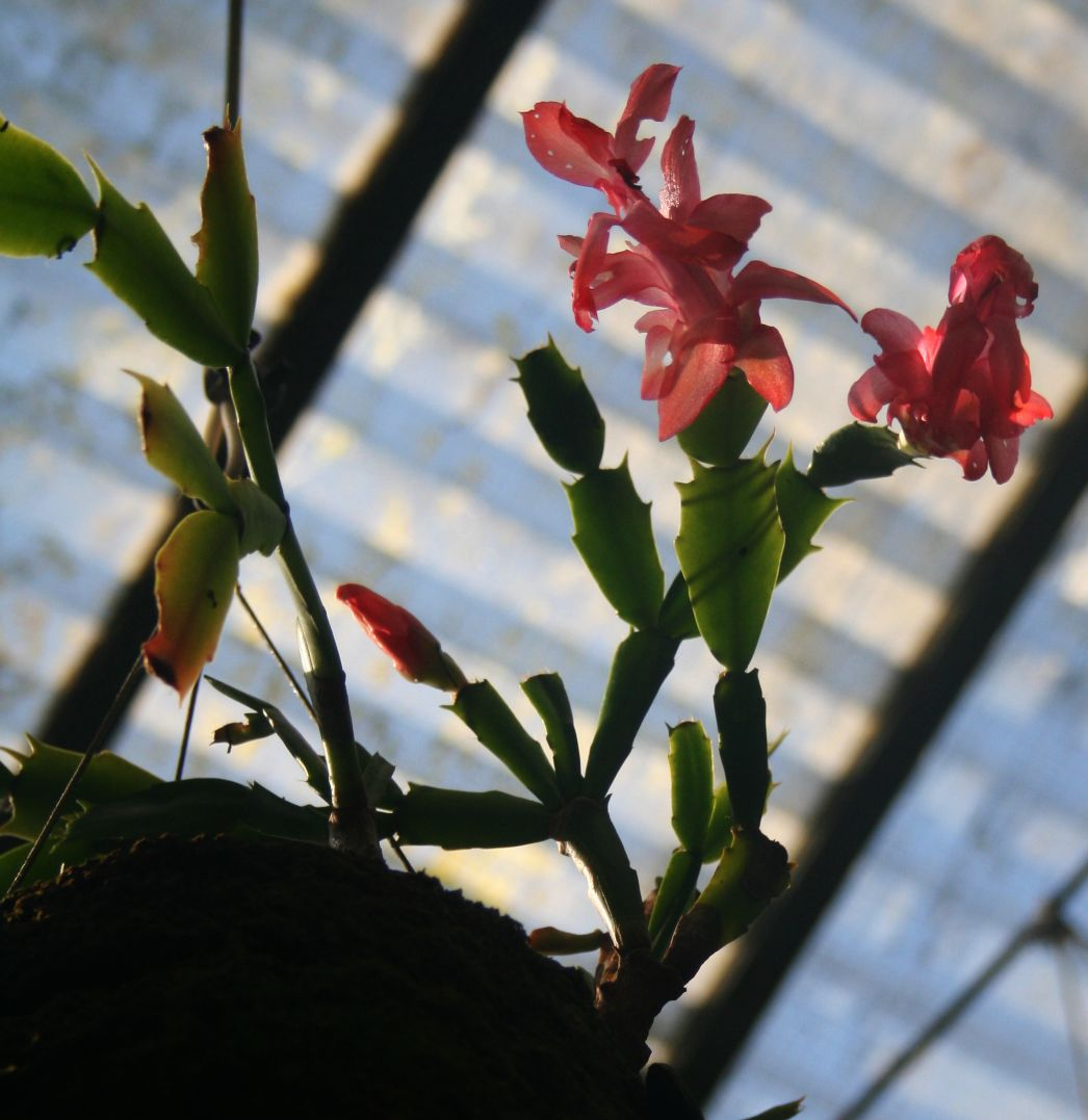 Schlumbergera truncata (Brazília) a madridi Real Jardín Botanico-ban